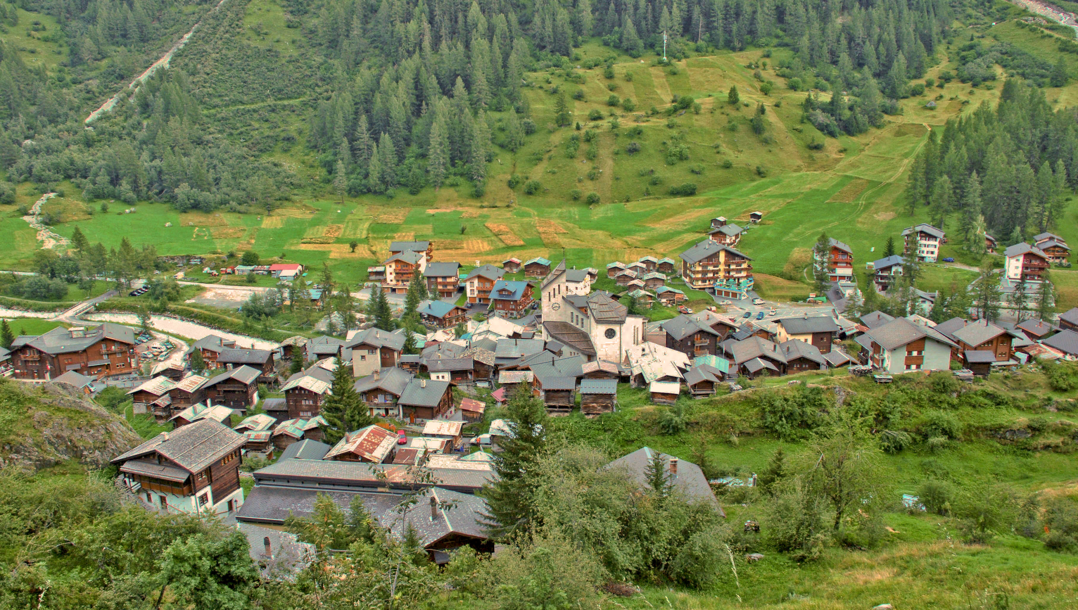 en.: Blatten at Lötschental, Switzerland; dt.: Blatten im Lötschental, Schweiz